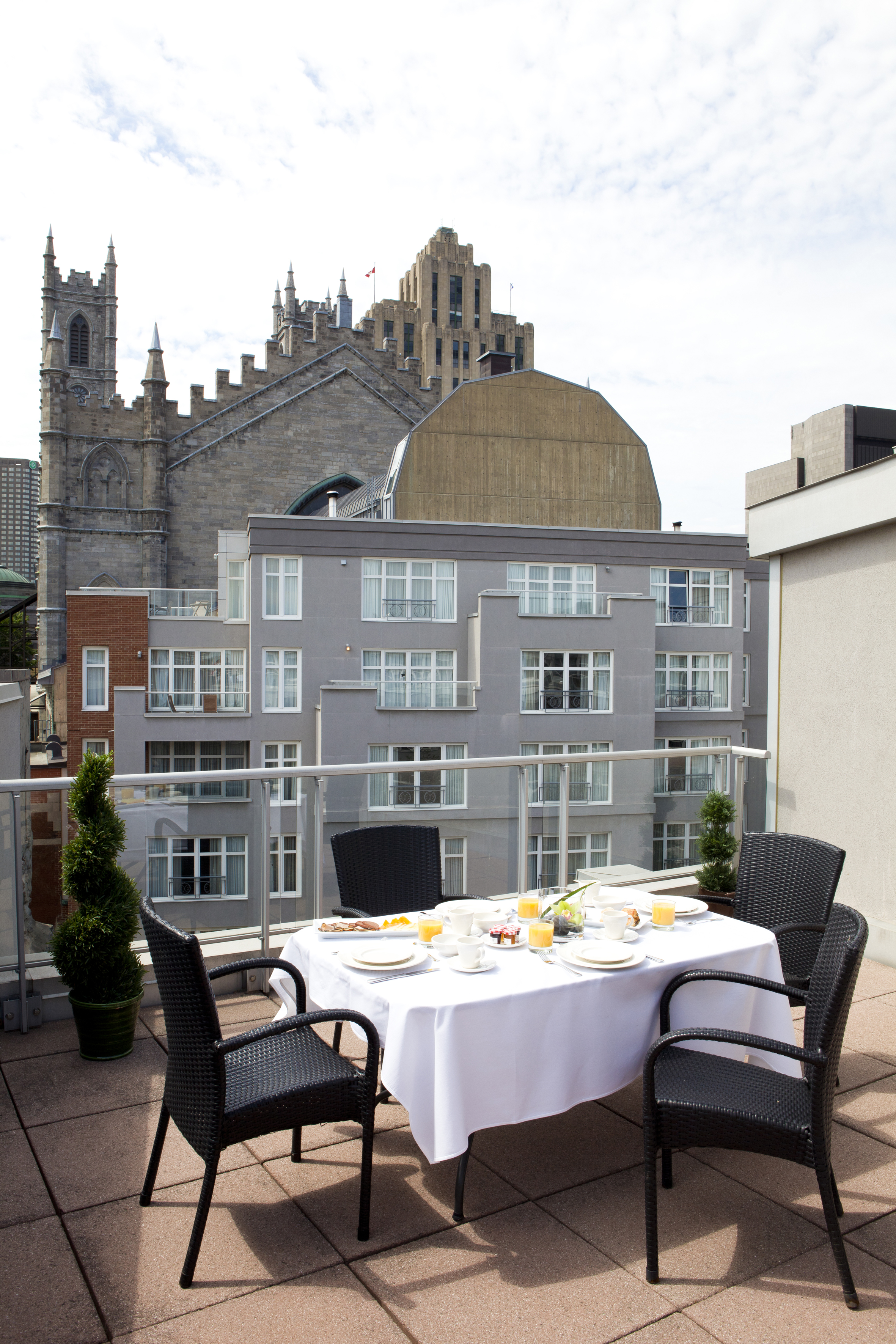 Cet hôtel de luxe affichant 4 étoiles est doté de 108 suites spacieuses, d'un jardin-terrasse ouvert en saison ainsi que d'un restaurant gastronomique. On aperçoit en haut la basilique Notre-Dame et l'édifice Aldred.